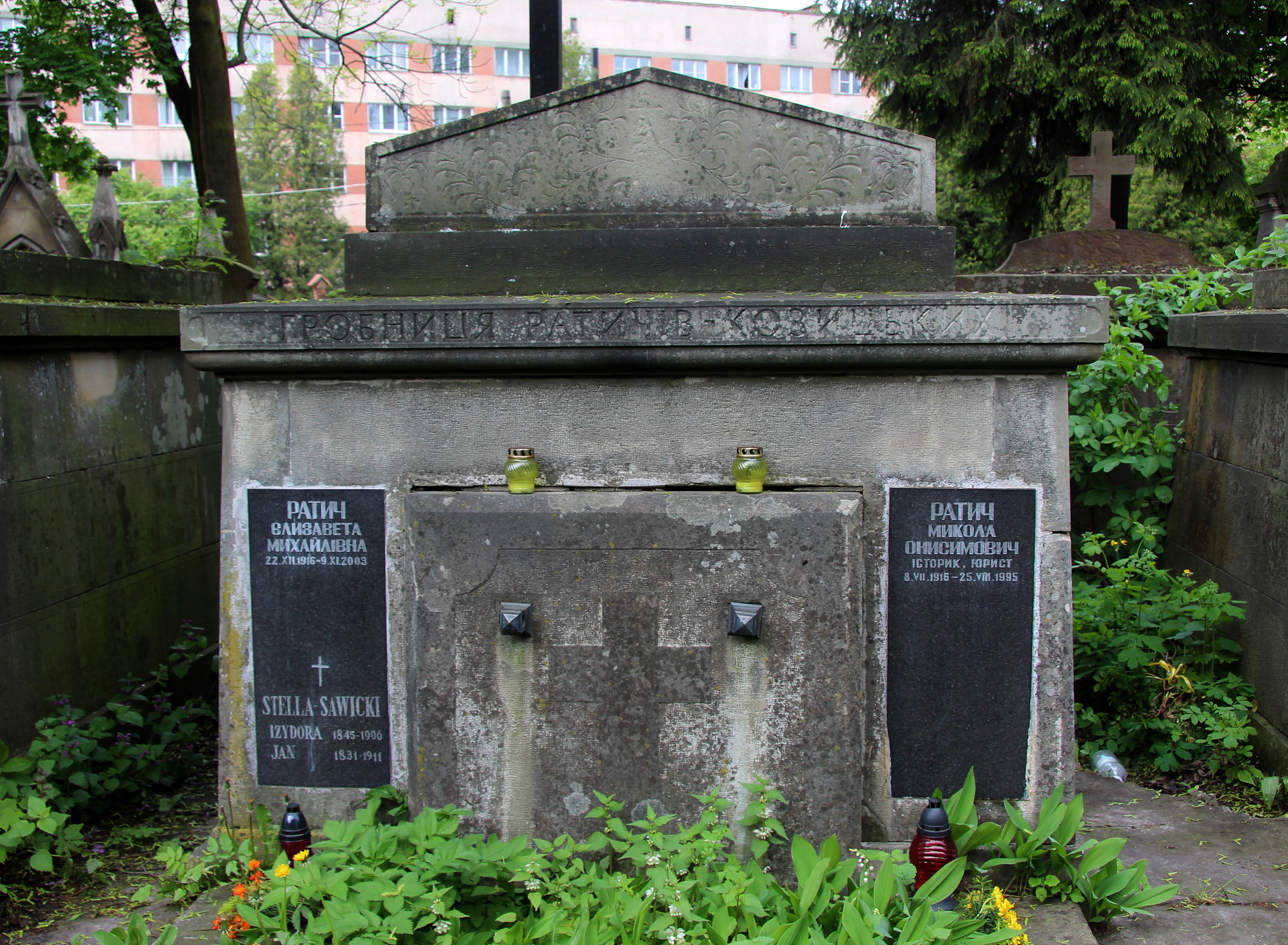 Гробівець Ратичів - Козицьких. Личаківський цвинтар , поле №1.